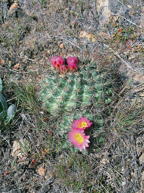 Pediocactus nigrispinus in unberührter Natur in Idaho